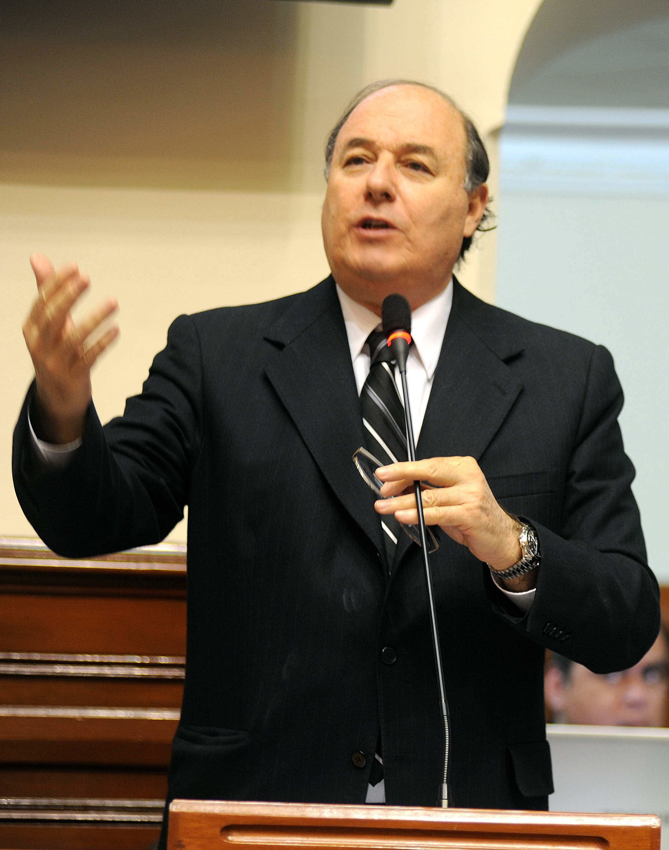 El congresista Raúl Castro Stagnaro fija su posición en el debate parlamentario realizado esta tarde por el Pleno.